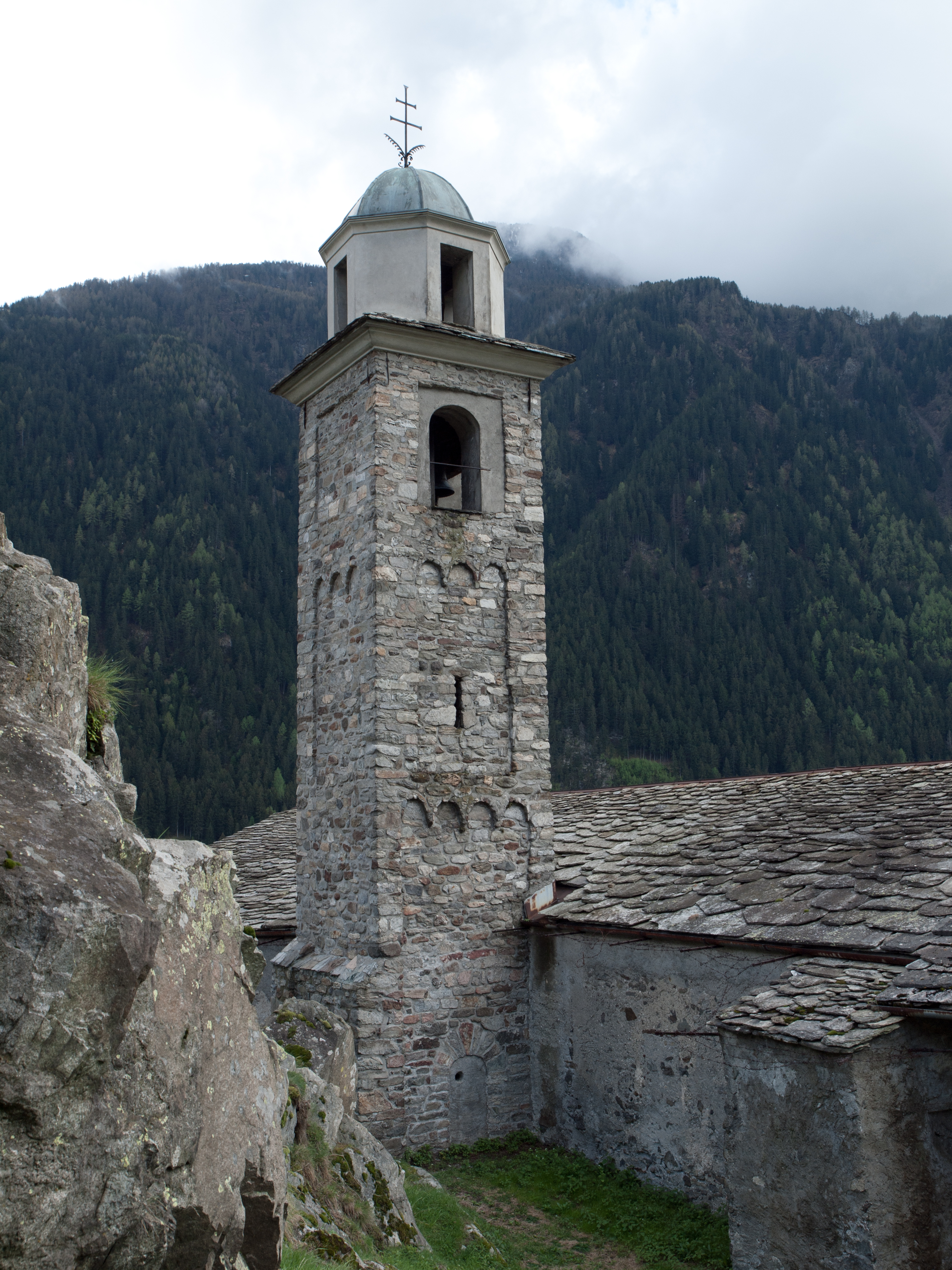 Sondalo, chiesa di Sant'Agnese (XIII secolo). Il campanile.